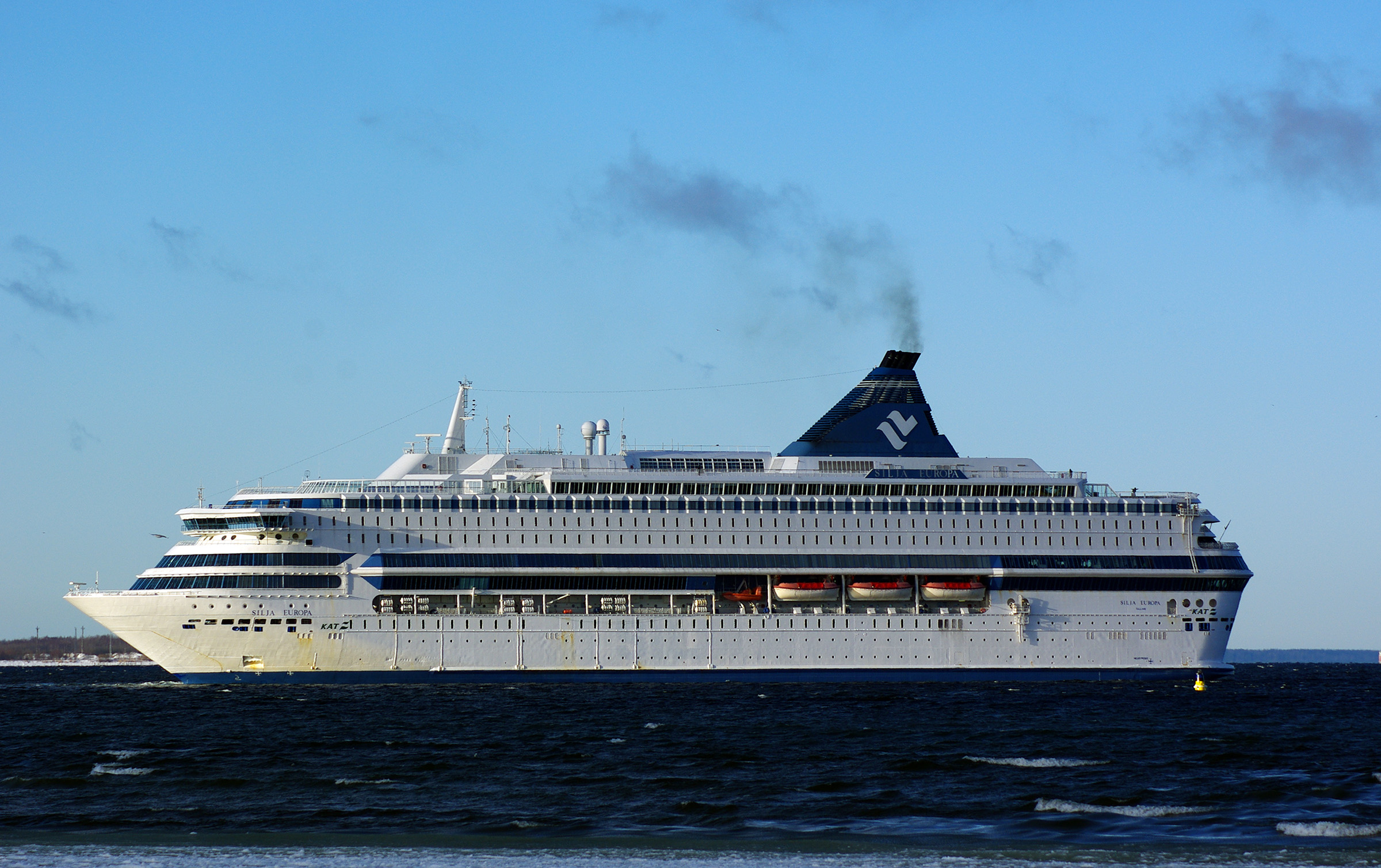 Silja Europa отправляется из Таллинна, второй день работы на линии Таллинн - Хельсинки, порт Ванасадам, Таллиннский залив, Балтийское море, Эстония